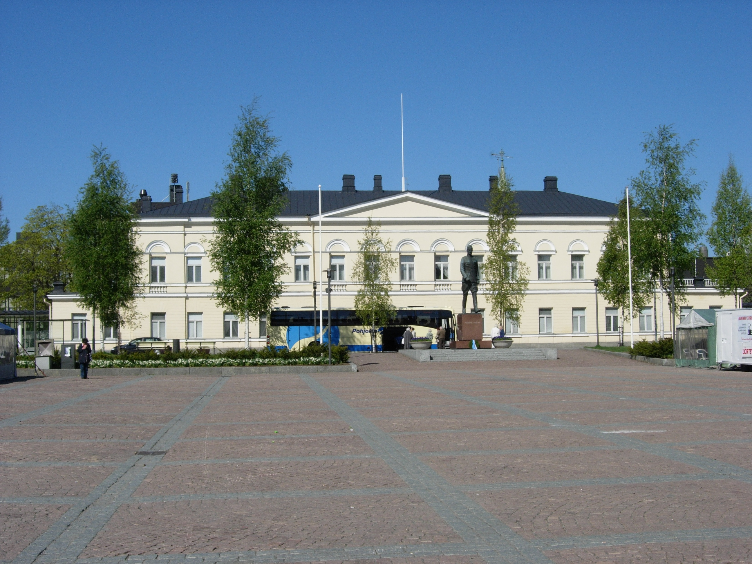 Itä-Suomen lääninhallitus, Maaherrankatu 16, Mikkeli.